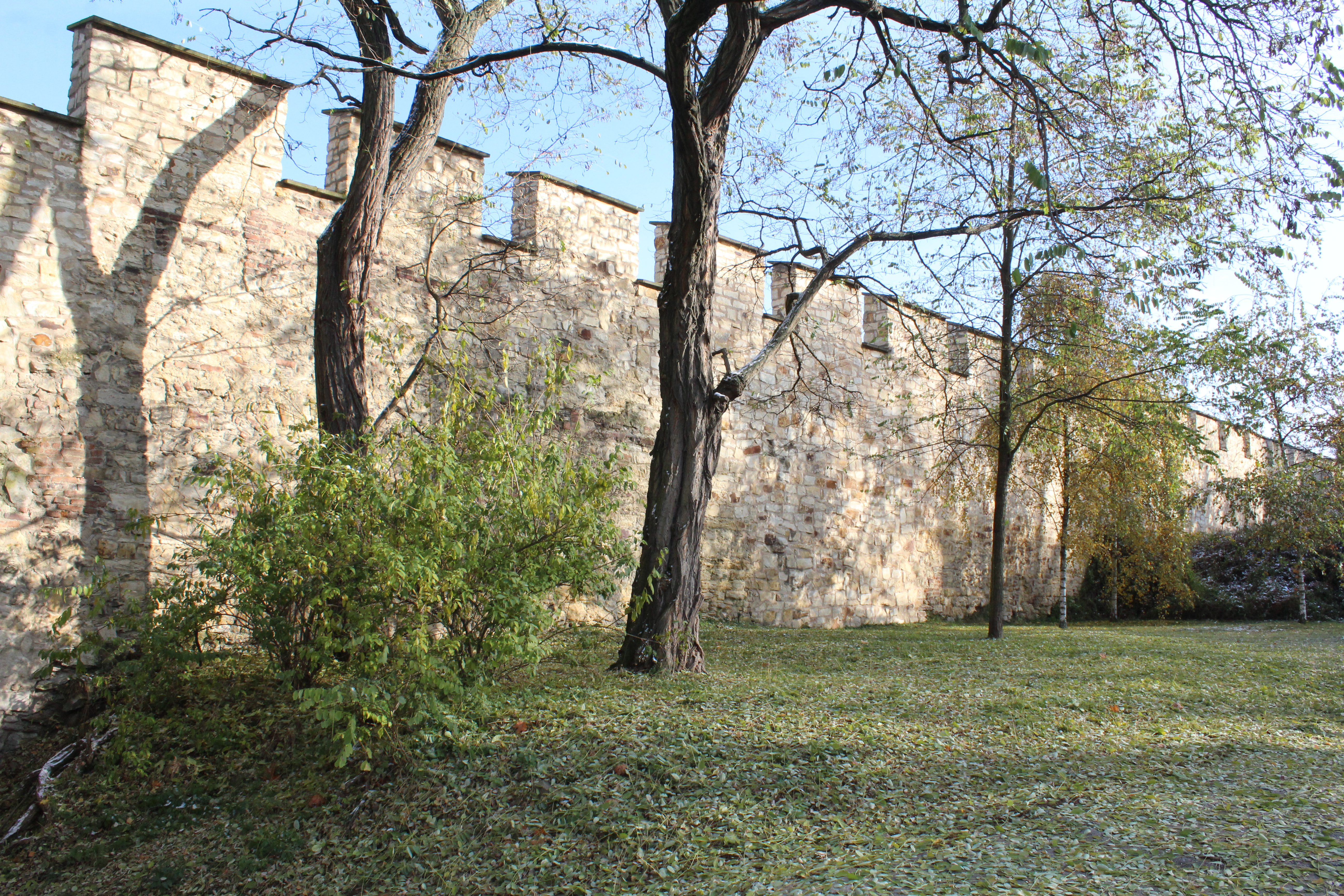 Mur de la Faim de Prague.